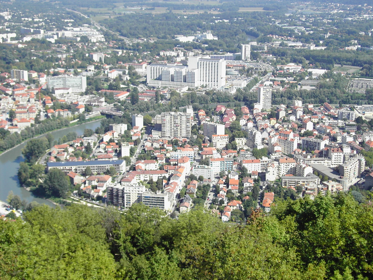 quartier de l'ile verte et C.H.U. au second plan